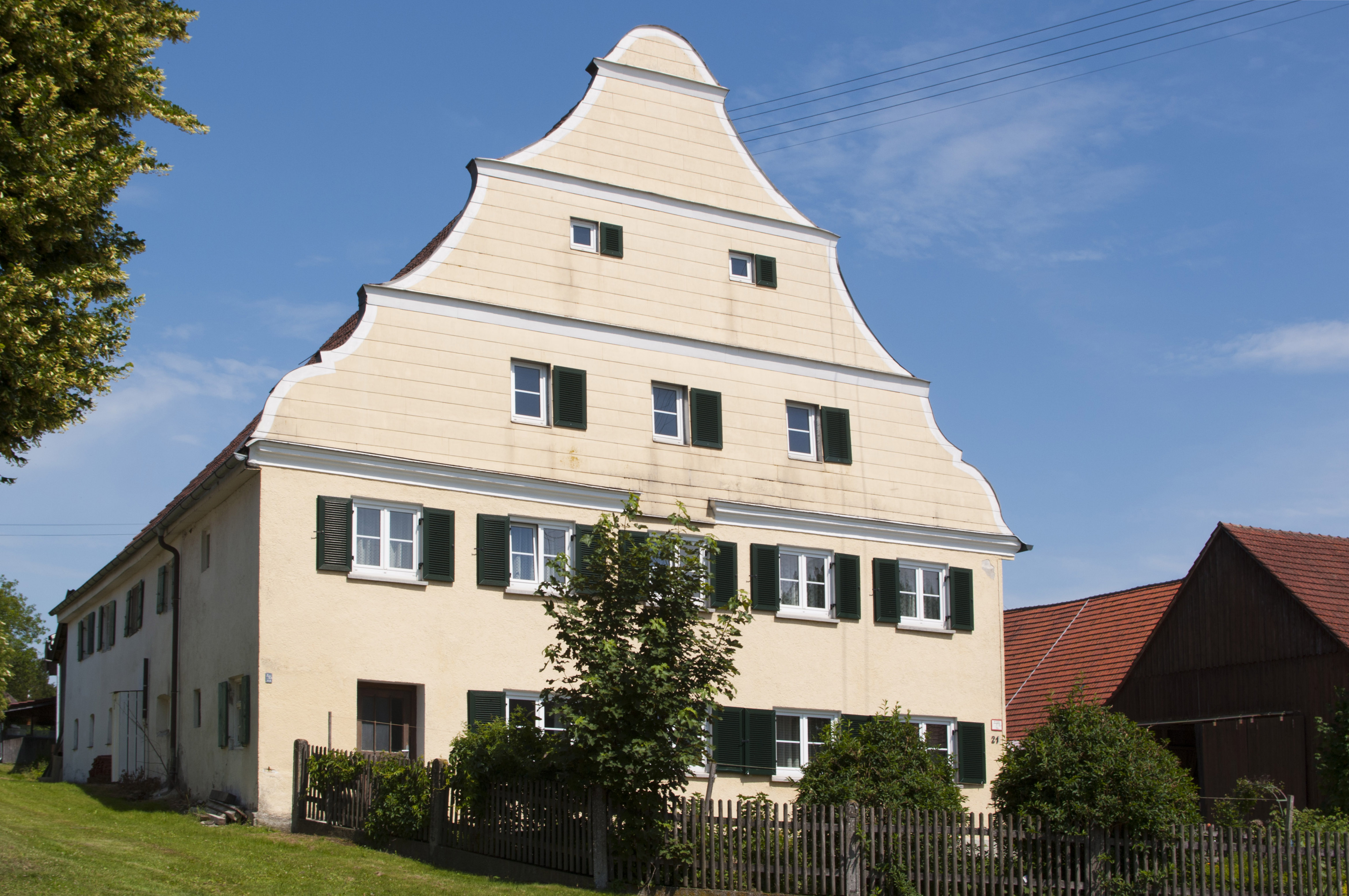 Wohnstallhaus aus der Mitte des 18. Jahrhunderts